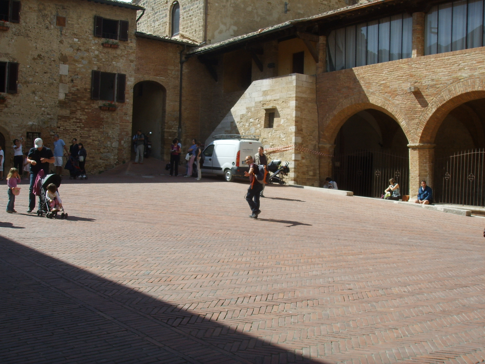 San gimignano corte del duomo